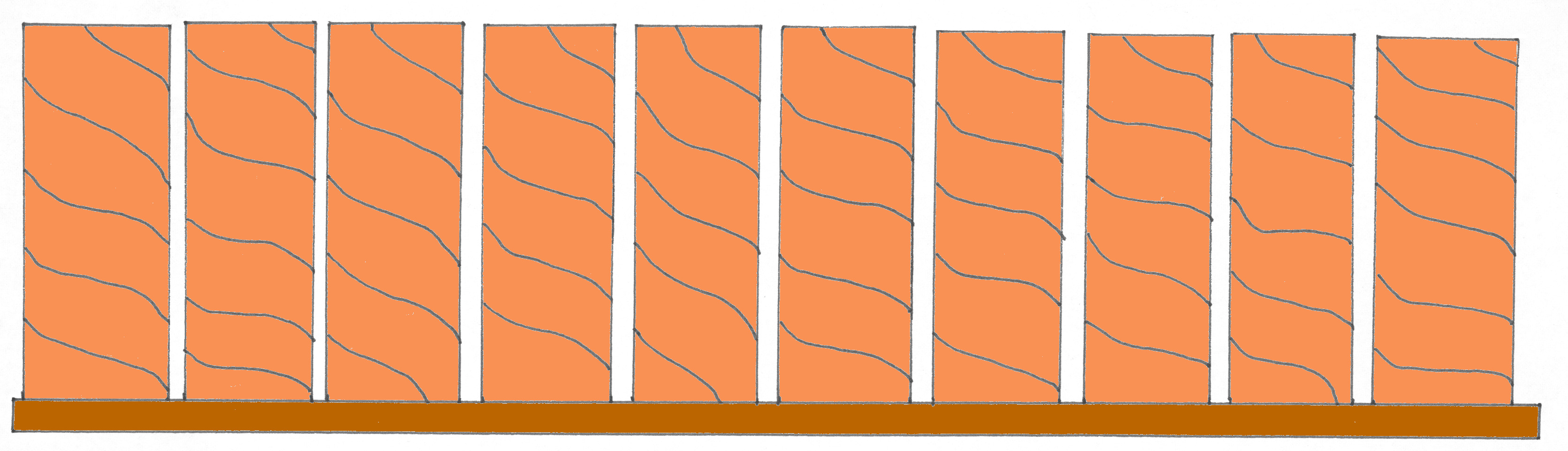 Schema von Tuftvelour